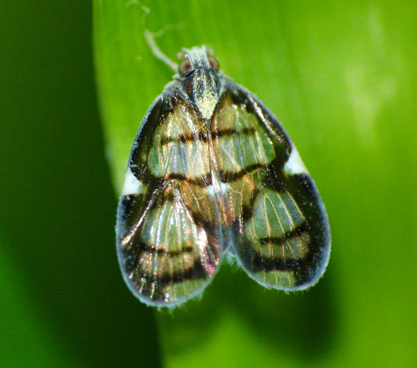 Unidentified Cixiidae. Nilgiris